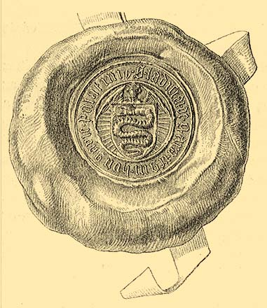 Garai László nádor (1410 - 1459) pecsétje - Angyal által tartott és sugaraktól övezett pajzsban jobbra néző, ötször tekeredő kigyó; körirata: • S(igillum) Ladislai • de • gara • regni • hungarie • palatini